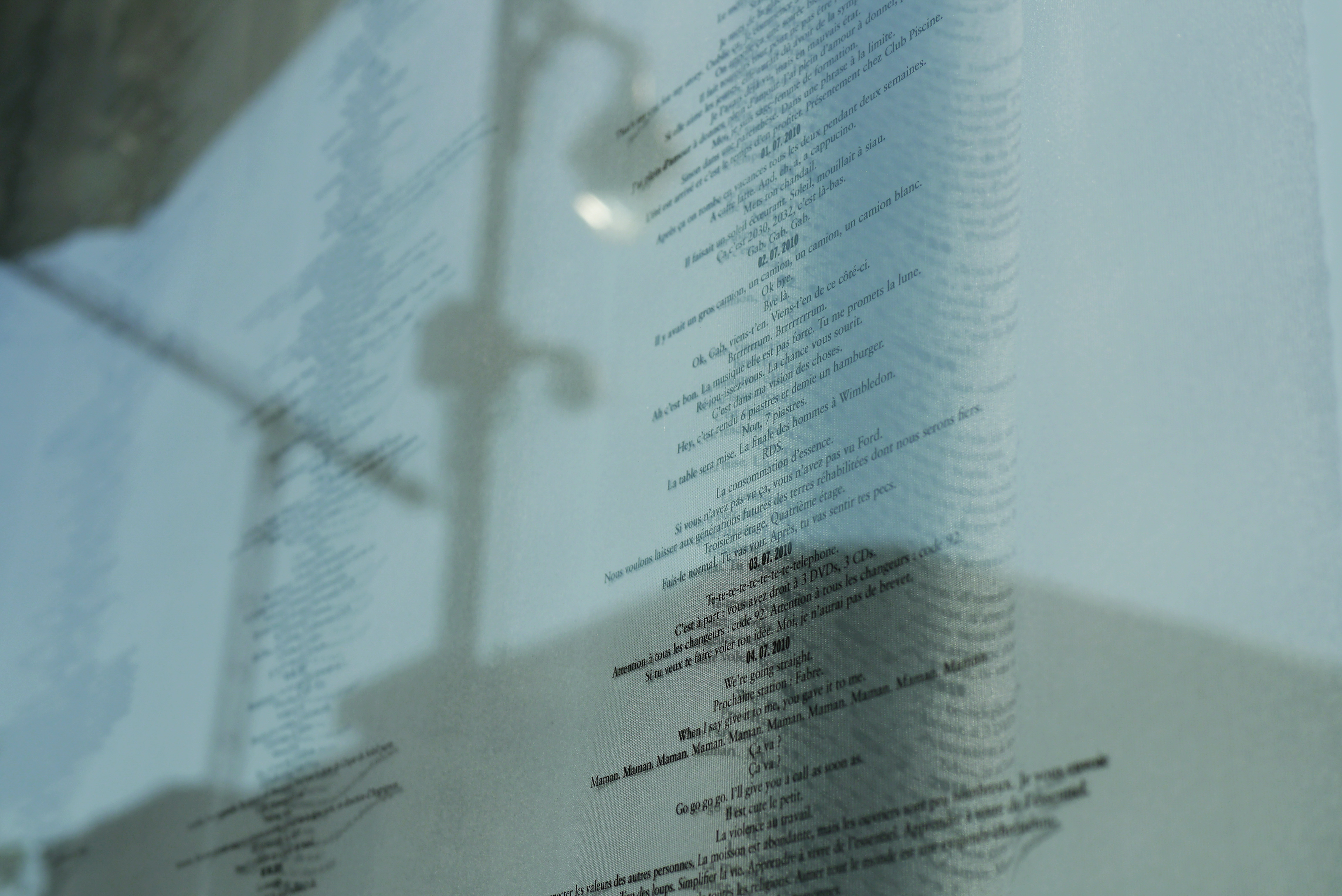 Steve Giasson, VOX, 2016 Installation de l'artiste Steve Giasson, visible du 9 août au 9 octobre 2016, sur les vitres du 2-22, Montréal. VOX est constitué de toutes les phrases entendues distinctement puis retranscrites manuellement par l'artiste Steve Giasson, entre le 25 juillet 2009 et le 24 juillet 2010, à l'extérieur de son appartement. De fait, cette oeuvre conceptuelle peut être interprétée comme le produit d'une surveillance radicale et performative par l'artiste, du milieu dans lequel il évolue et des voix qui le scandent et le rythment. Justifié en son centre, afin d'évoquer graphiquement une onde sonore, ce texte peut se lire comme un portrait par et sur ses contemporains, mais également comme un autoportrait en creux (dans la mesure où il est souvent possible, à la lecture, de suivre les déplacements de Steve Giasson, qui se voit ainsi surveillé à son tour).